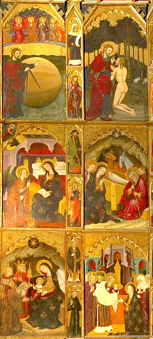 Retaule del Sant Esperit de la Seu de Manresa. Carrers del costat esquerre.